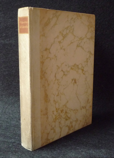 Paul Scheerbart: Lesabendio, Originalausgabe, Georg Müller, München und Leipzig 1913